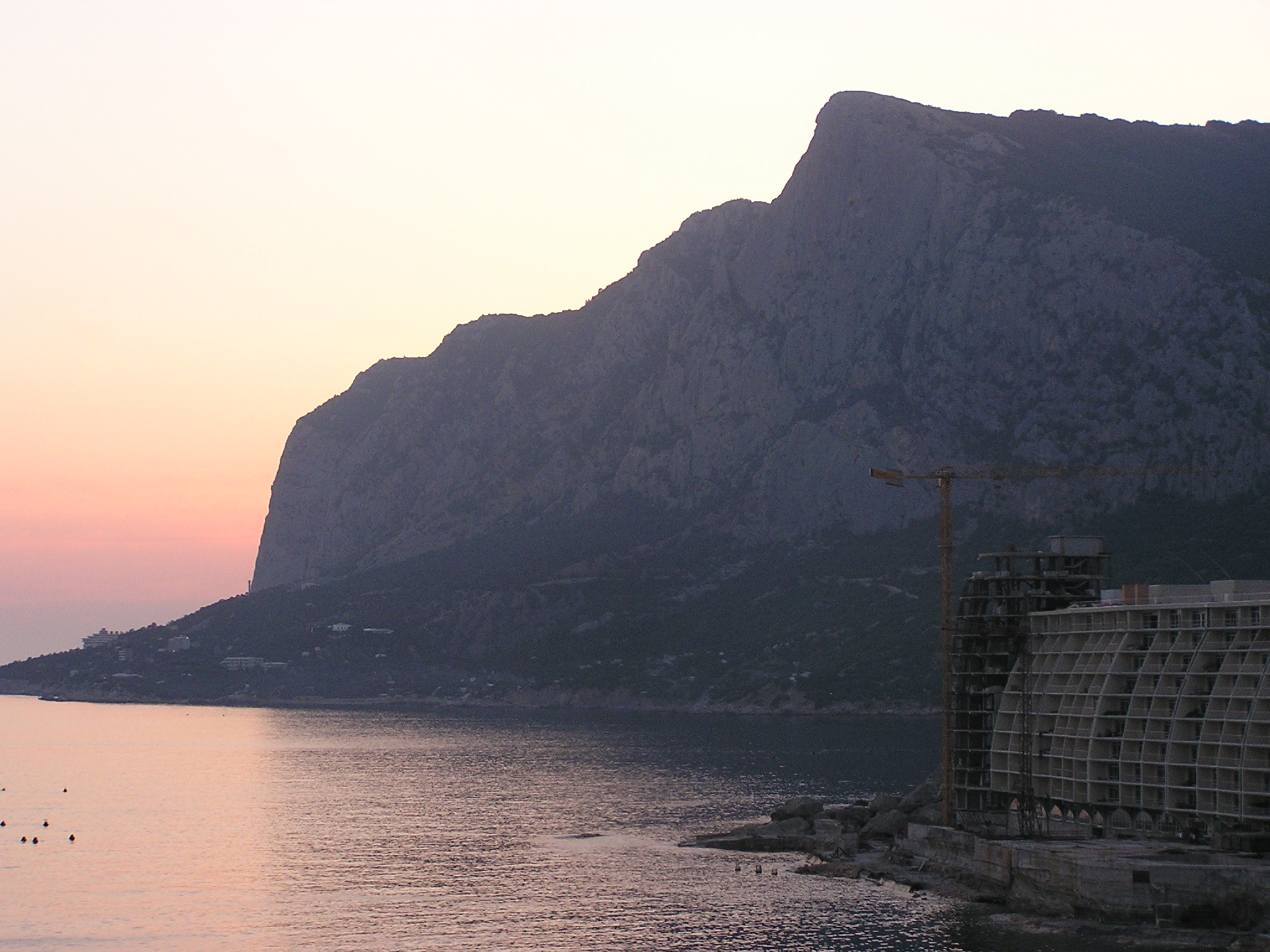 Ласпи